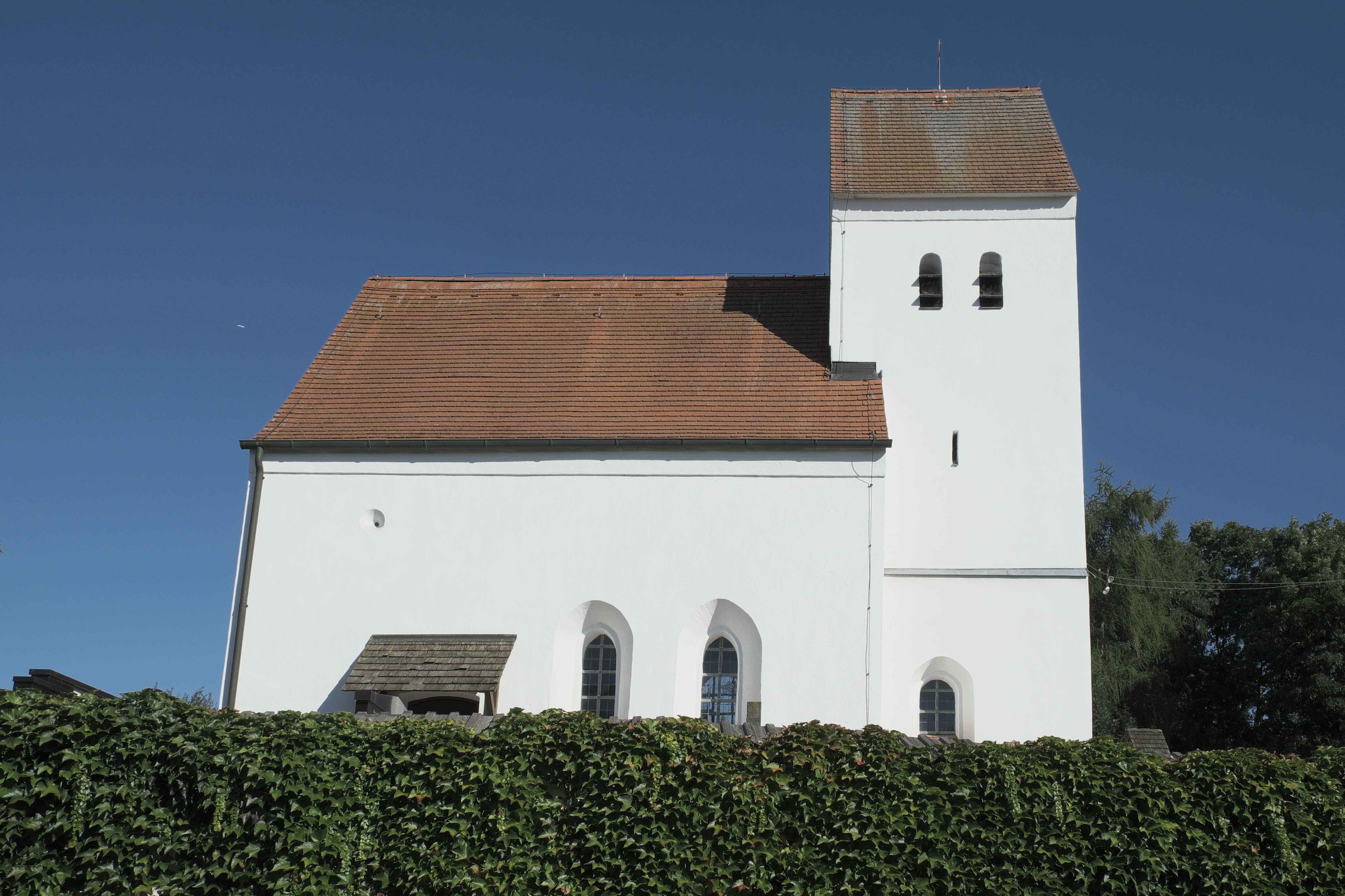 Katholische Filialkirche St. Ulrich in Fußberg (Maisach) im Landkreis Fürstenfeldbruck (Bayern/Deutschland)